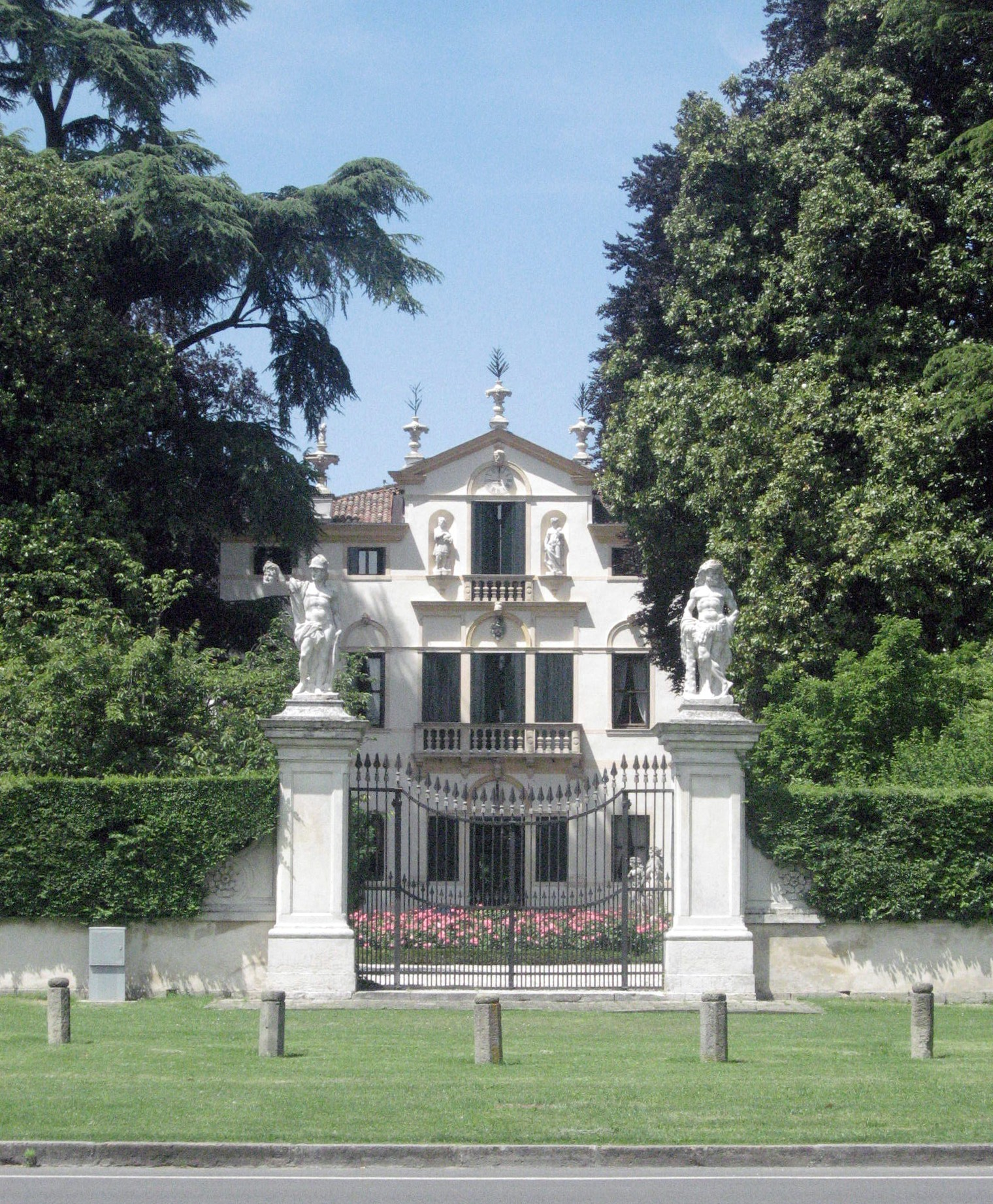 Villa Vendramin Cappello Collizzolli a Noventa Padovana